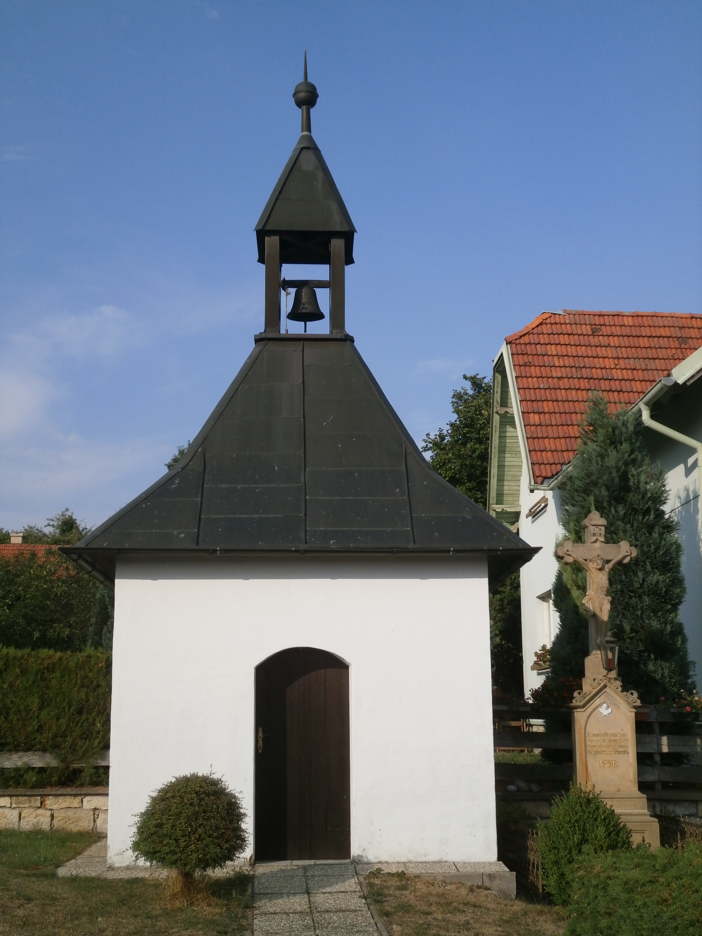 Leština - zvonice